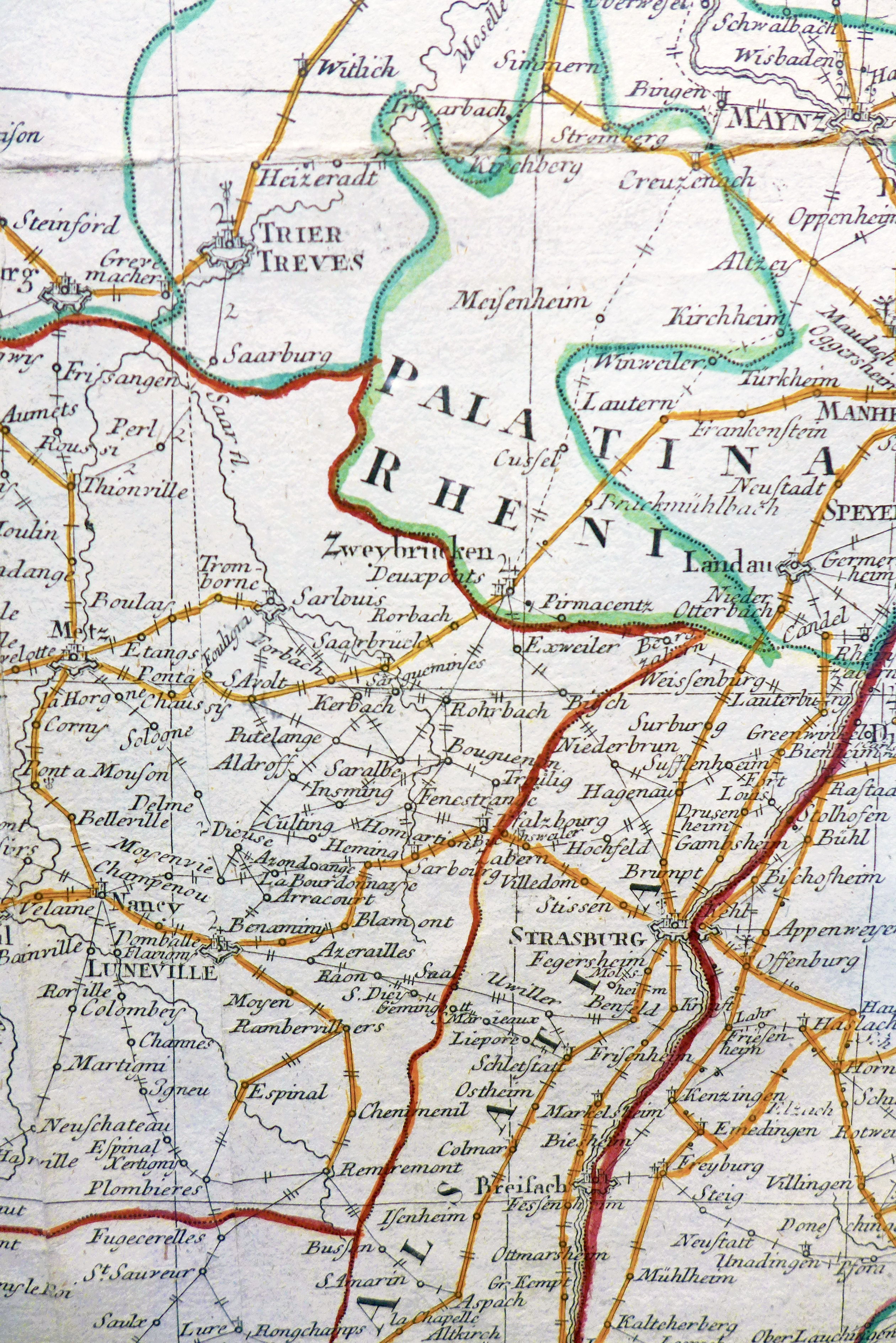 Postrouten der Saarregion im Jahr 1786, Neue und vollständige Postkarte durch ganz Deutschland und die angränzenden Theile der benachbarten Länder aufs accurateste zusammengetragen, von verschiedenen übersehen, wohl corrigiret, ausgefertiget und mit Allergnädigsten Kayserlichen Privilegio herausgegeben von den Hoemännischen Erben in Nürnberg 1786 (Deutsches Zeitungsmuseum Wadgassen) , Die regulären Hauptlinien der Postkutschenrouten sind orangefarben markiert, die übrigen regulären Postrouten sind schwarz markiert